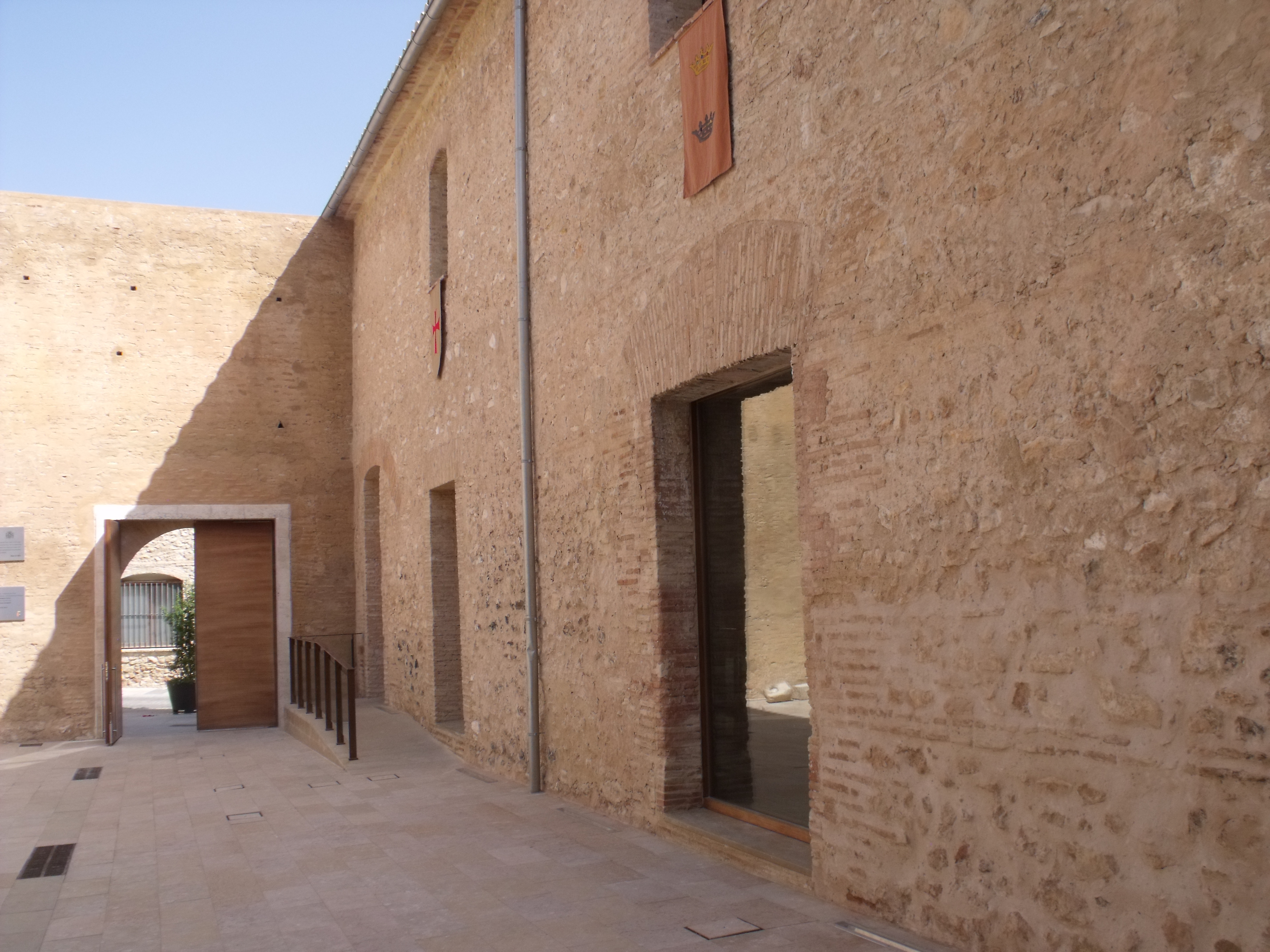 Detalle cuerpo secundario del castillo y acceso desde el patio del mismo.